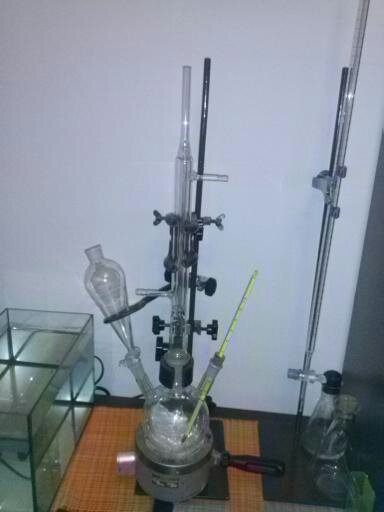 aparatura do nitrowania (obok akwarium)